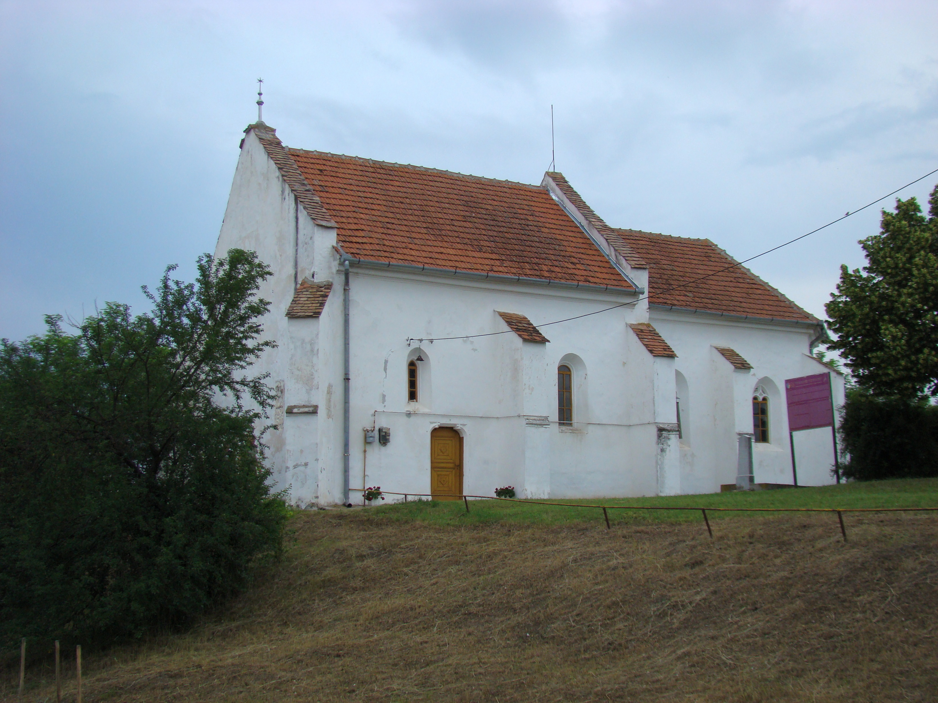 Biserica reformată, sat aparținător Sâncrai; municipiul Aiud, județul Alba 01